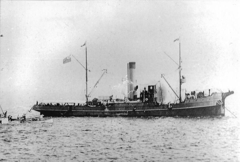 1911 TCHERNOMORE (s. auch CHERNOMOR) 1924 IROISE 1936 IRINI VERNICOS 1939 ATRATO 1948 THEOCLITOS